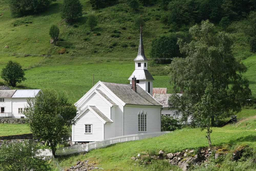 Bakka kirke in Nærøyfjorden, Norway.